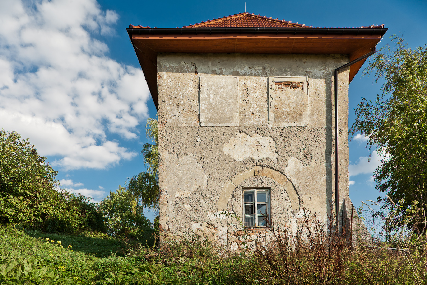 Dwór w Garlicy Murowanej - lamus